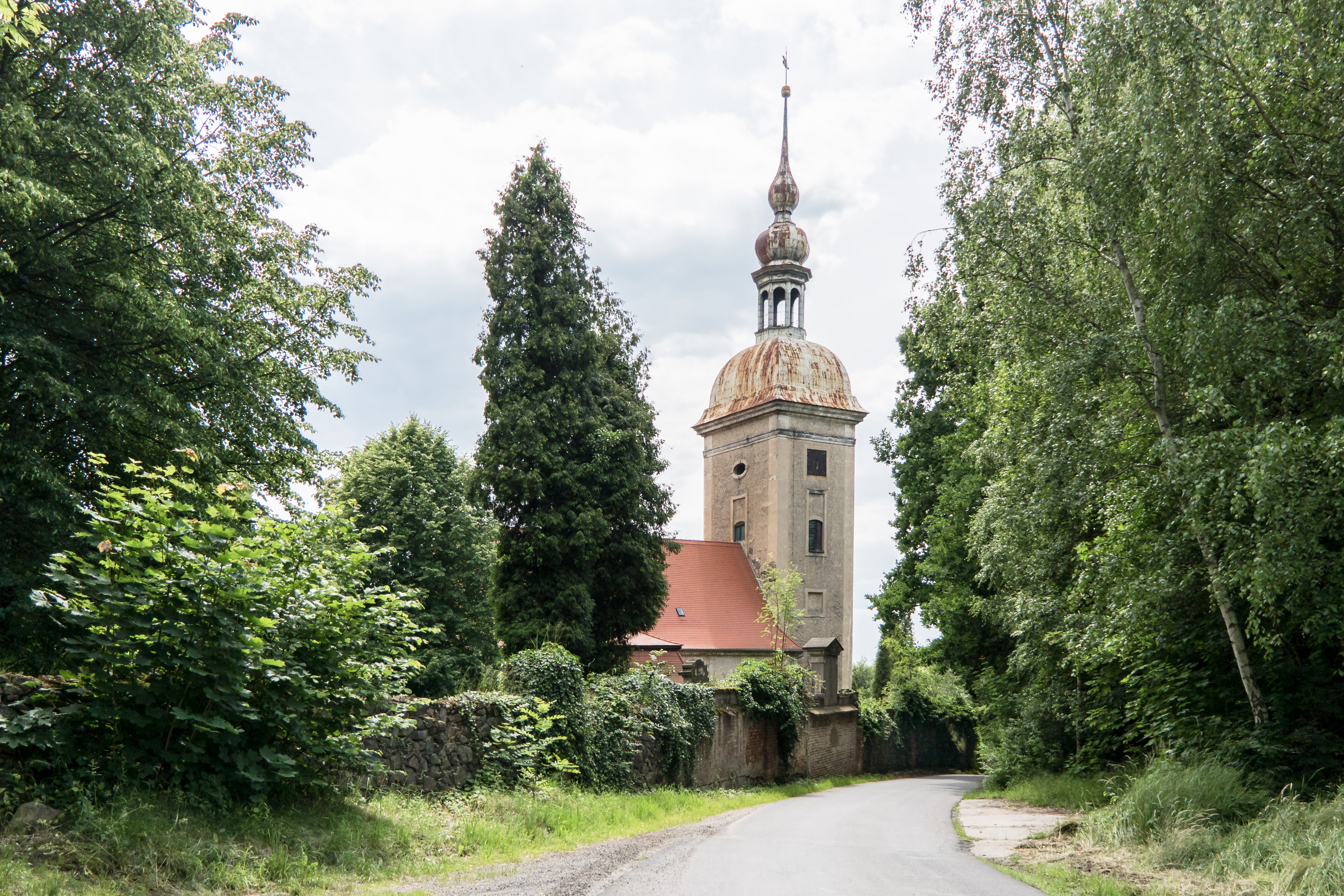 Matki Bozej Anielskiej/Kirche Niedow